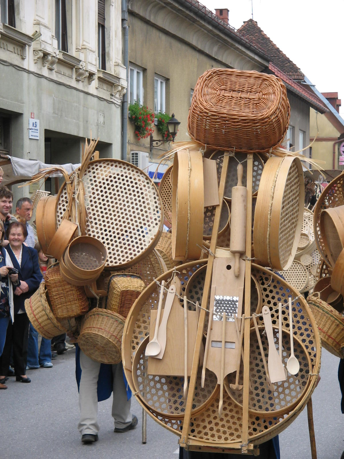 Jahres Market in Ribnica, Slovenija Quelle: eigene Aufnahme 05 Sept. 2005 Fotograf: Janez Novak, Ljubljana, Slovenija